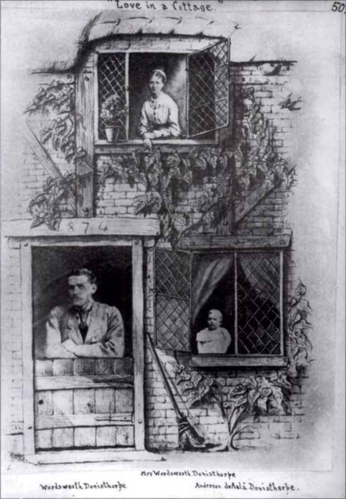 Joshua Taylor Donisthorpe (XIX век). Lovе in a Cottage.